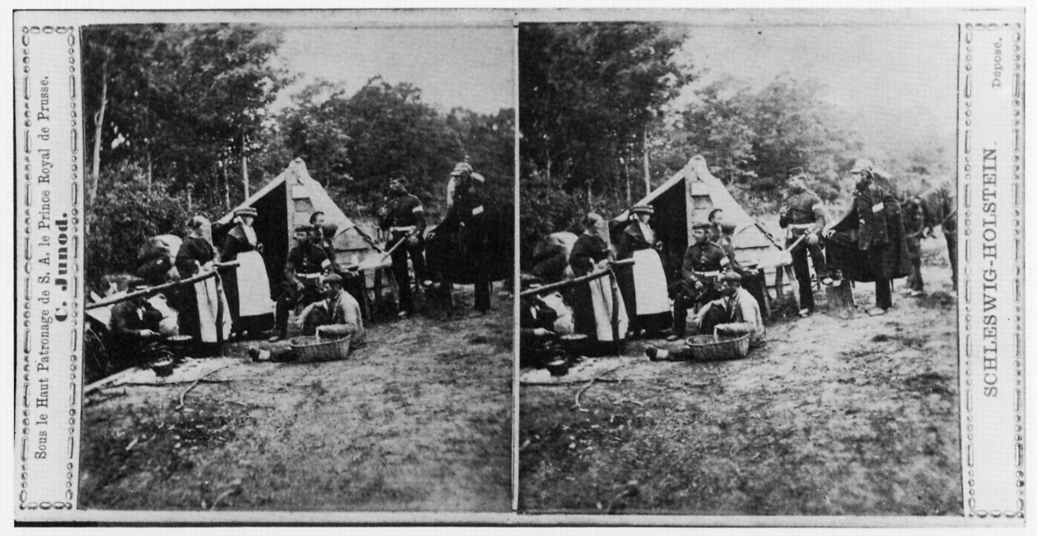 Junod, Charles: Preußische Marketenderinnen in Dübbel